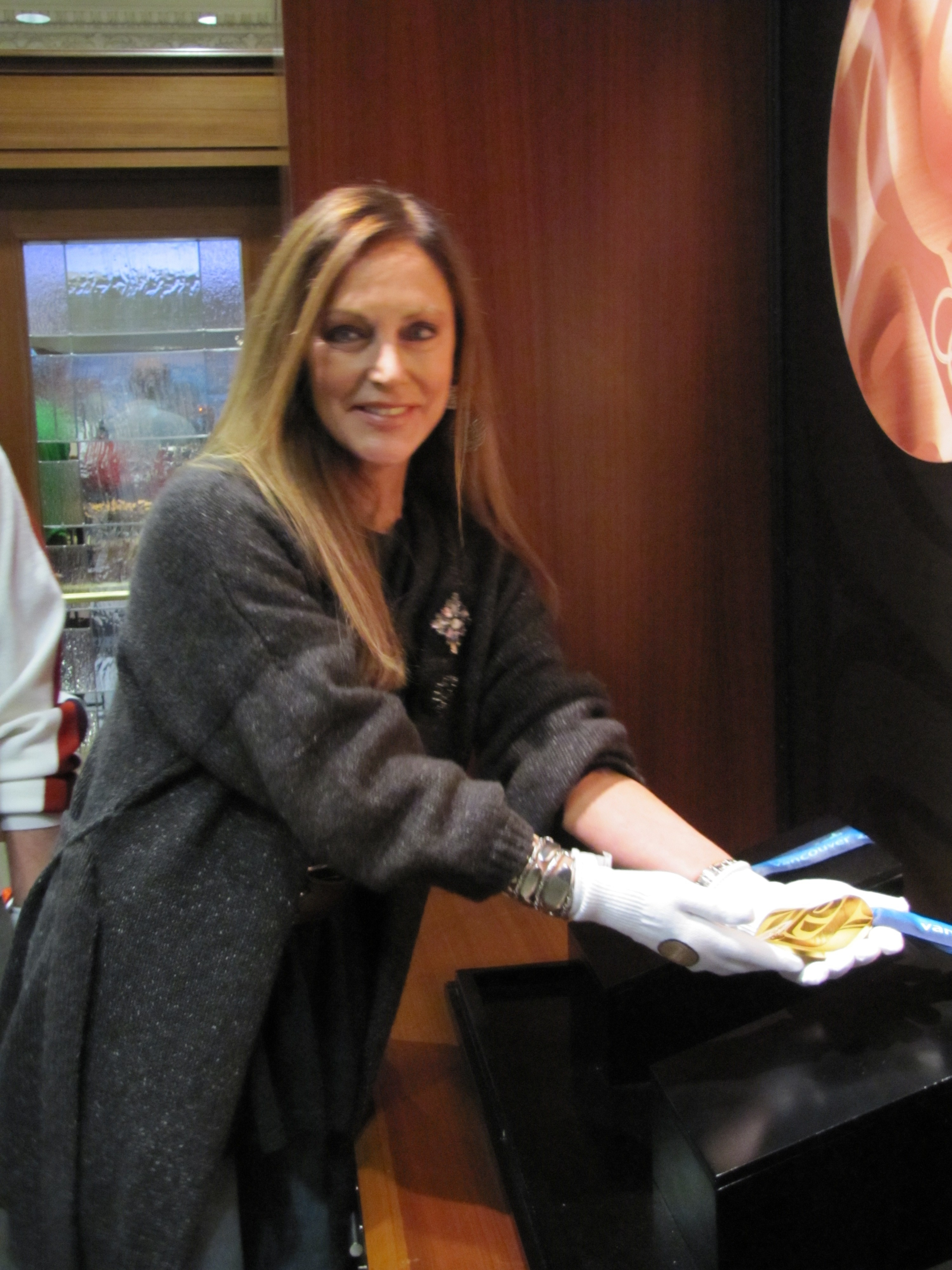 Peggy Fleming